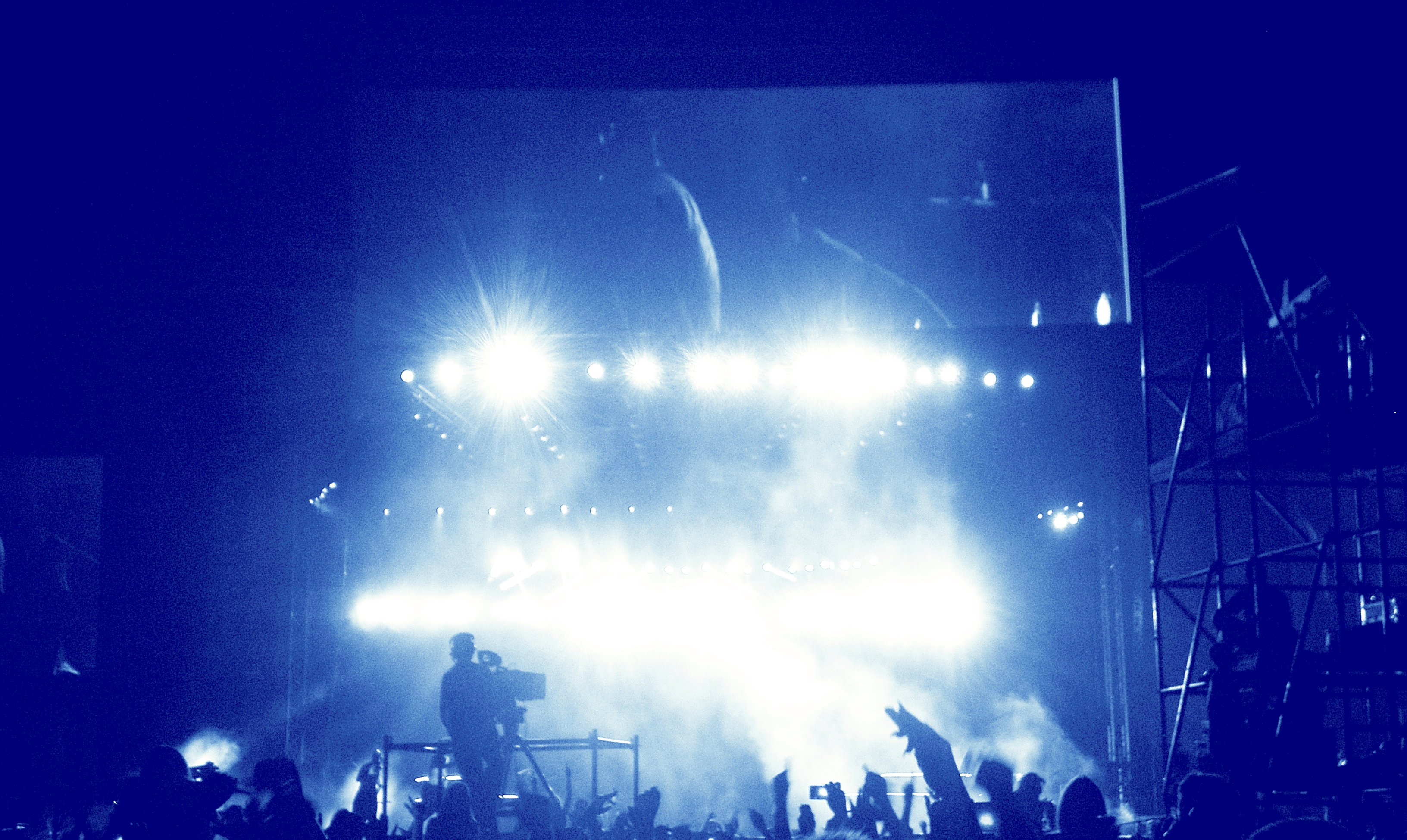 Део публике испред бине